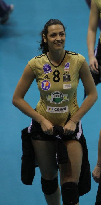 Mirela Delić, pallavolista croata, gioca nel ruolo di centrale